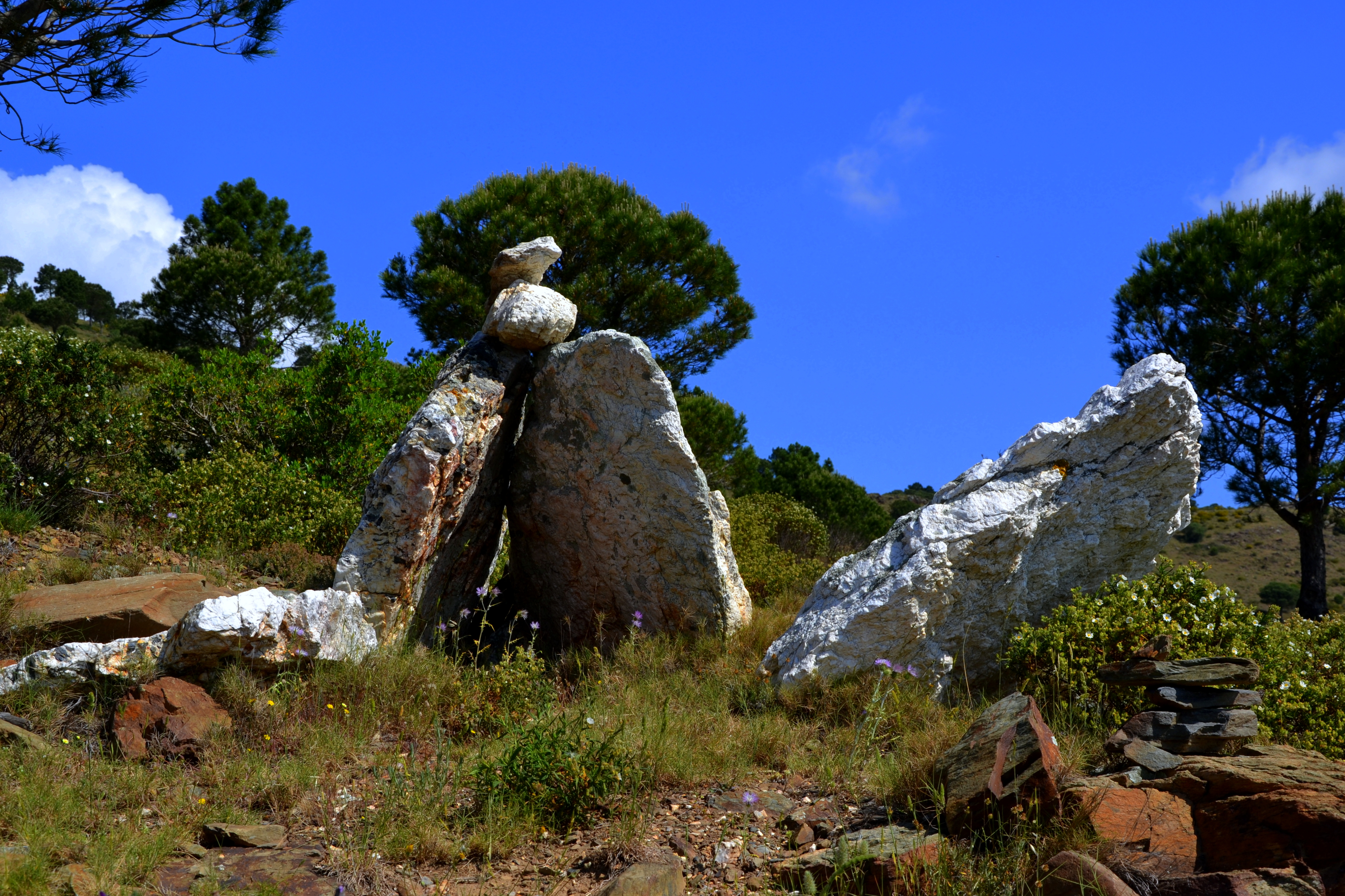 MassÃ­s de l'Albera (Alt EmpordÃ ) This is a a photo of a natural area in Catalonia, Spain, with id: ES510127